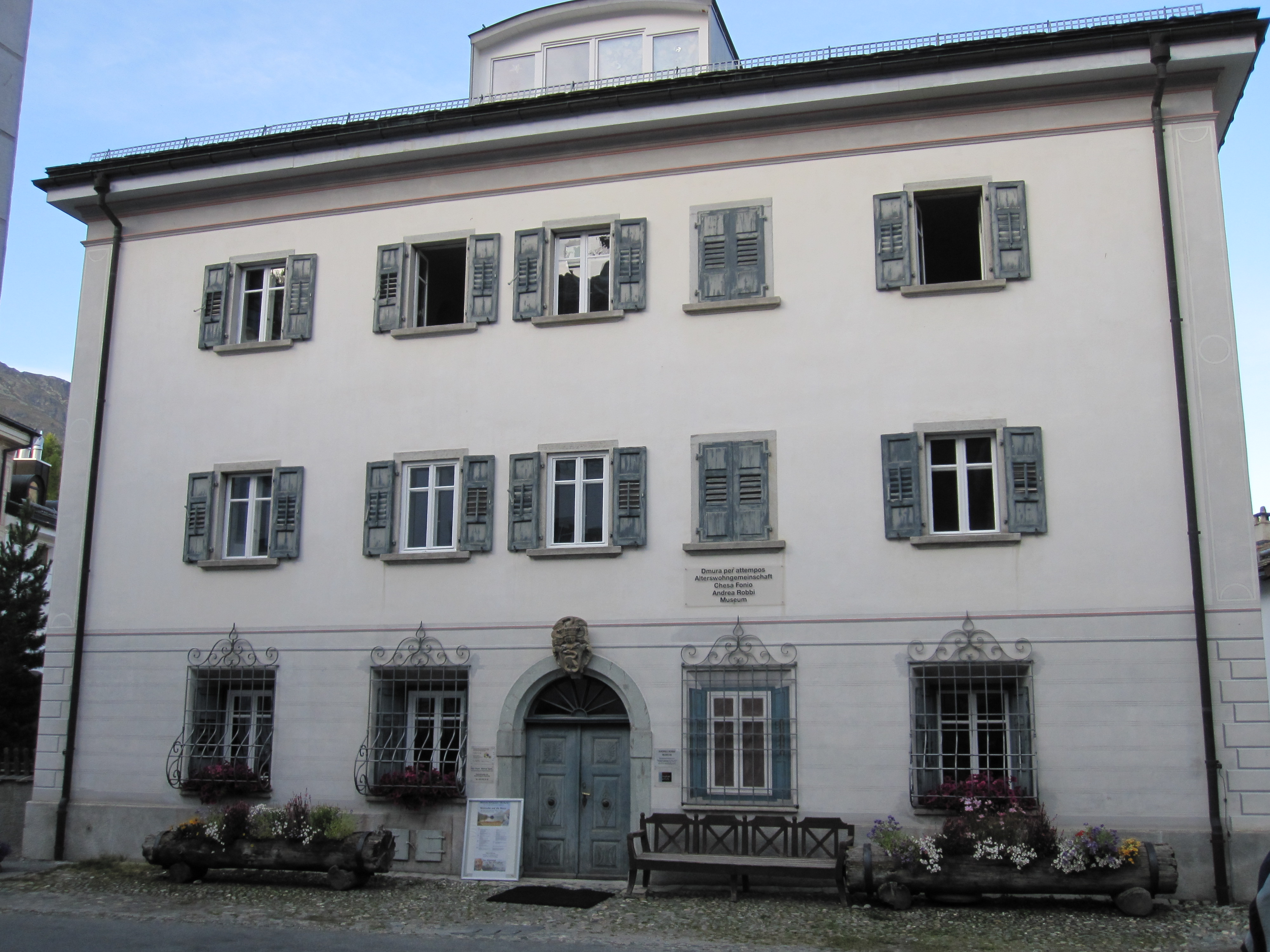 Chesa Fonio in Sils Maria (Oberengadin)Die Chesa Fonio wurde vormals als Pfarrhaus benutzt. Nach der Zusammenlegung der evang. Kirchgemeinden Sils/Silvaplana/Champfèr bildete sich ein Initiativkomitee mit dem Ziel, aus dem Haus eine Alterswohngemeinschaft für mehrheitlich einheimische Senioren zu machen. Unter dem Präsidium von Kurt Siegenthaler wurde mit finanziellen Mitteln der Gemeinde Sils,privaten Spenden und übernommenen Genossenschaftsanteilen der ausführenden Handwerker ein Umbauvorhaben verwirklicht, welches das alte Haus zu einer behindertengerechten und modernen Alterswohngemeinschaft machten. Gleichzeitig wurde im Auftrag der Andrea-Robbi-Stiftung in Zusammenarbeit mit Robert Barth und Sepp Müssgens ein Museumstrakt angebaut und der Robbi-Stiftung verkauft. Heute ist das Haus eine Mischform von Alterswohnungen, einem Kulturbüro, dem Mittagstisch fpr Schulkinder und dem Museumsbetrieb. Die Genossenschaft wird präsidiert von Franzisca Egeler.